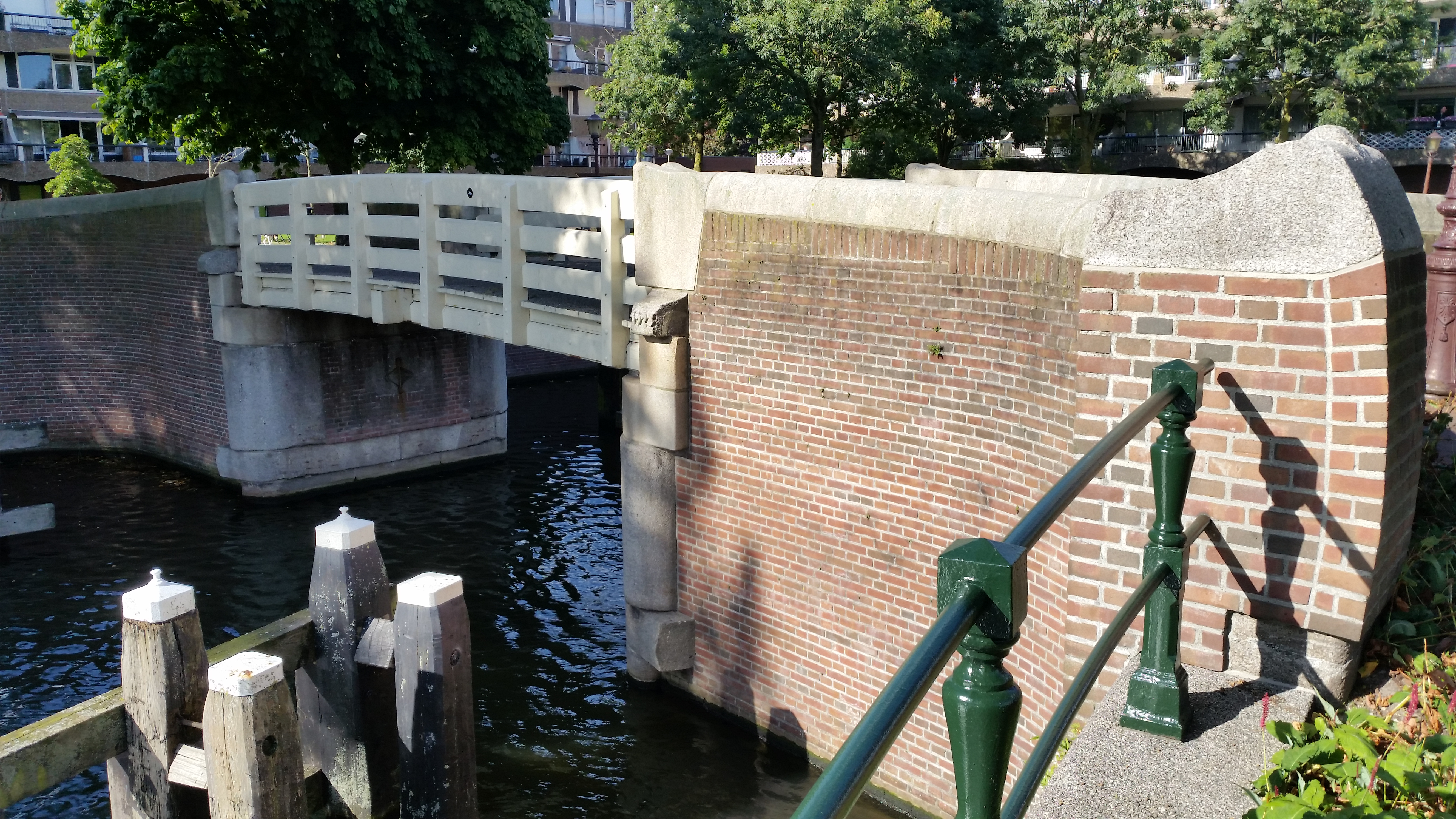 Zijaanzicht van Brug 270, Kippebrug